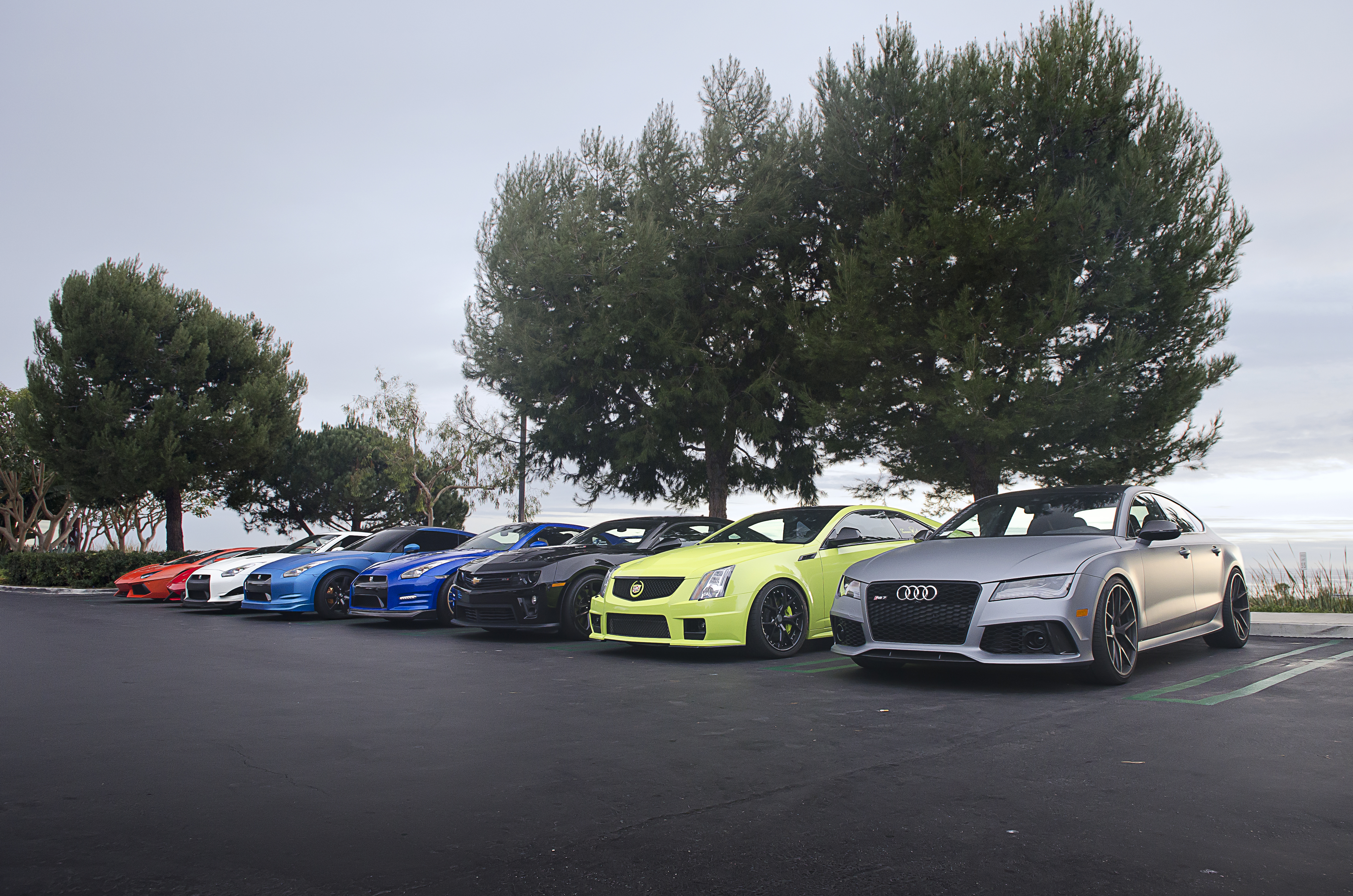 Lamborghini Aventador Lamborghini Gallardo Super Trofeo Stradale Nissan GTR x 3 Chevy Camaro Cadillac CTSV Audi RS7